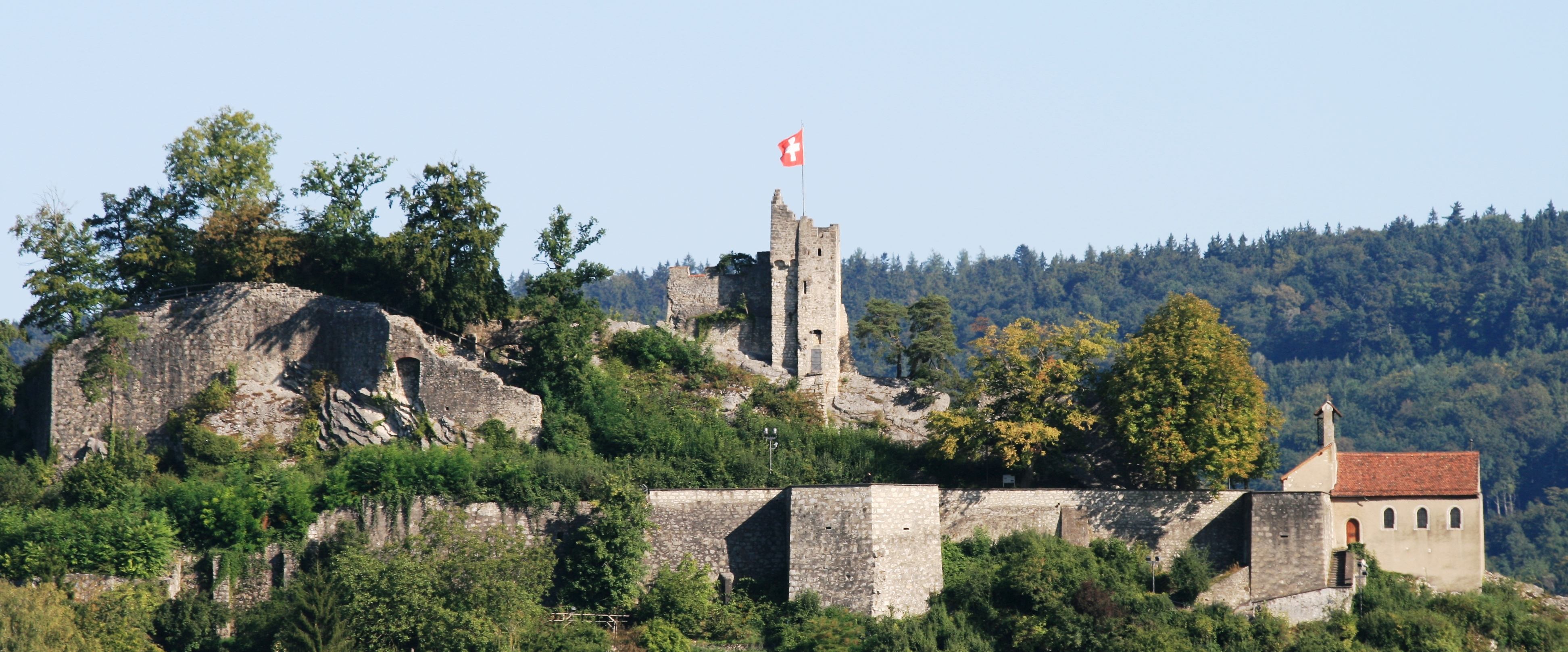 Ruine Stein, Baden AG, Schweiz